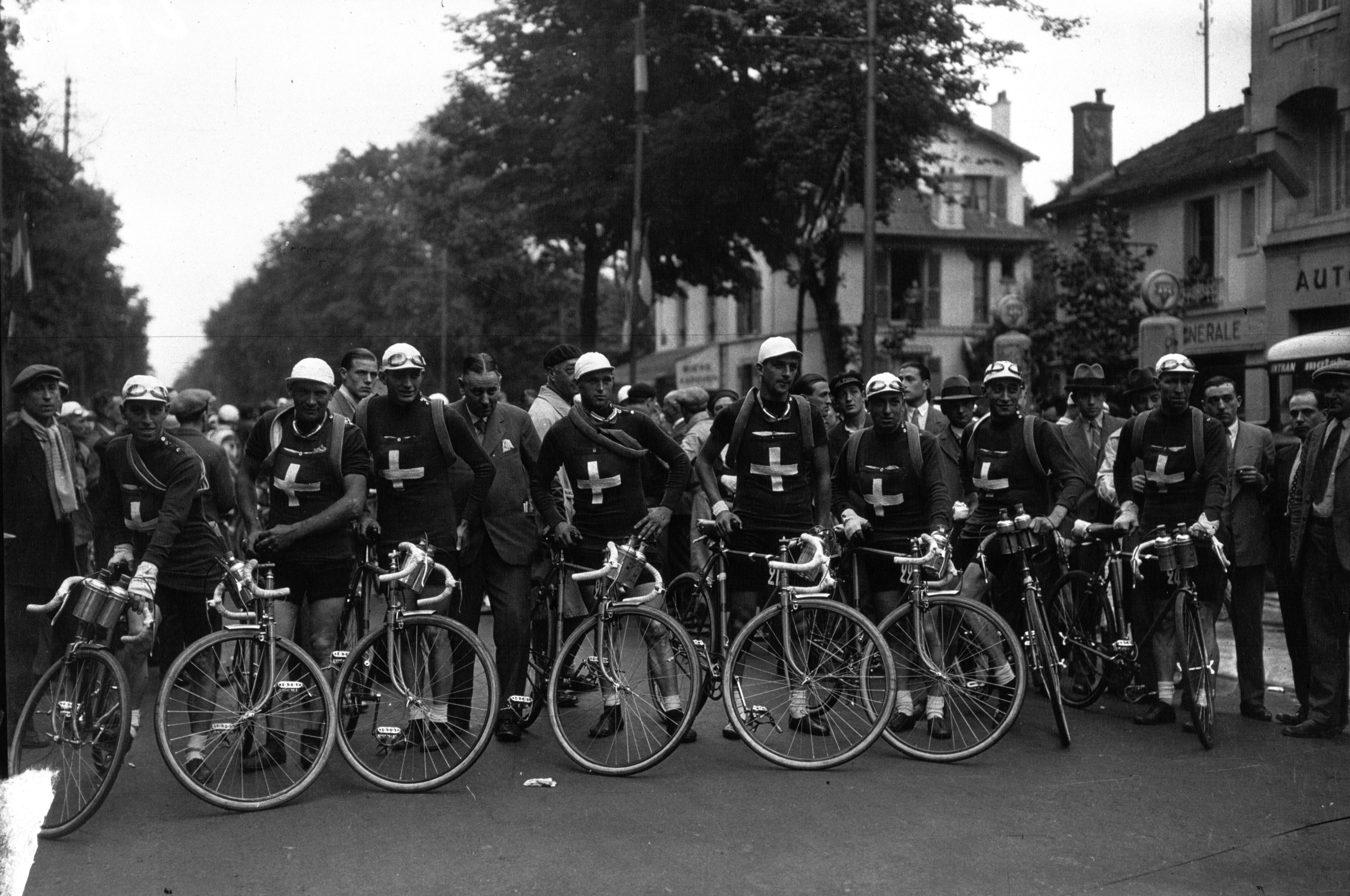 Équipe suisse lors du Tour de France 1932. De gauche à droite, Albert Büchi, Ernst Hofer, Alfred Bula, August Erne, Türel Wanzenried, Alfred Buchi, Roger Pipoz, Georges Antenen